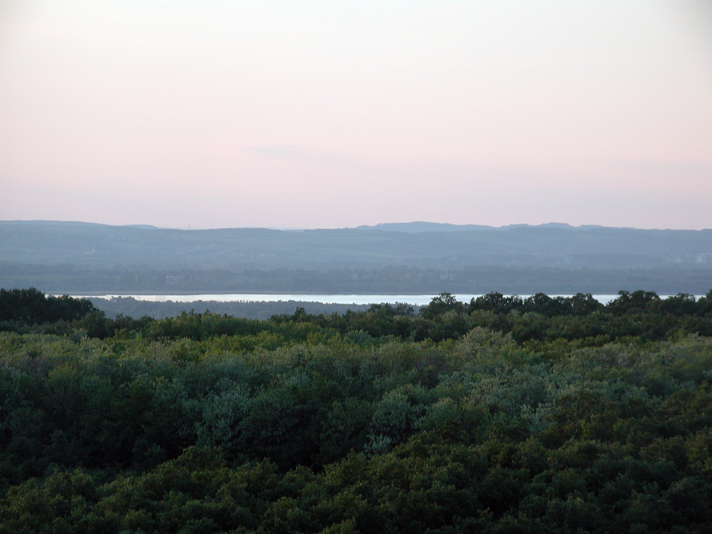 Bucht der Zalamündung